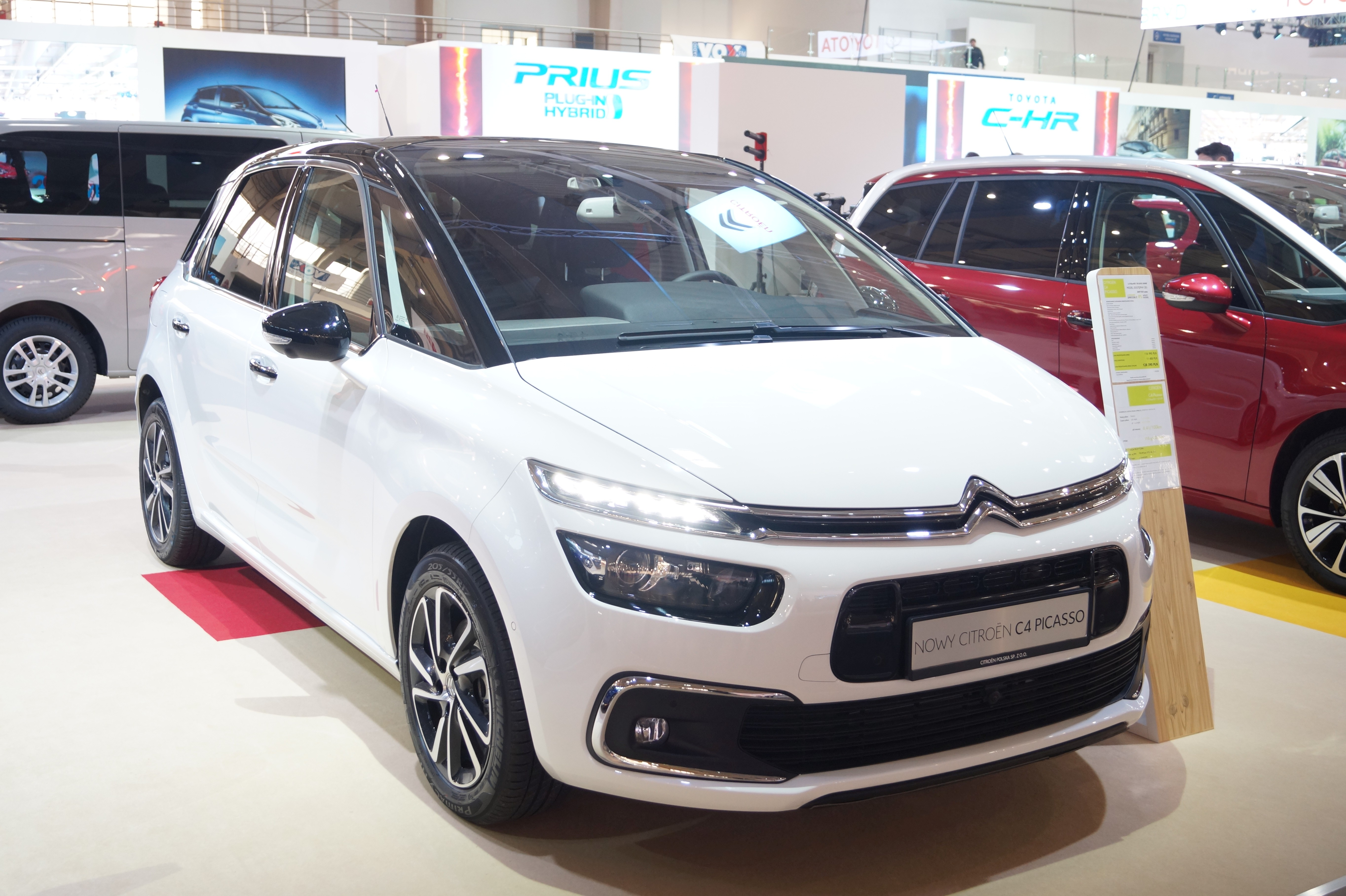 Prawy przód Citroëna C4 Picasso na Motor Show Poznań 2017.